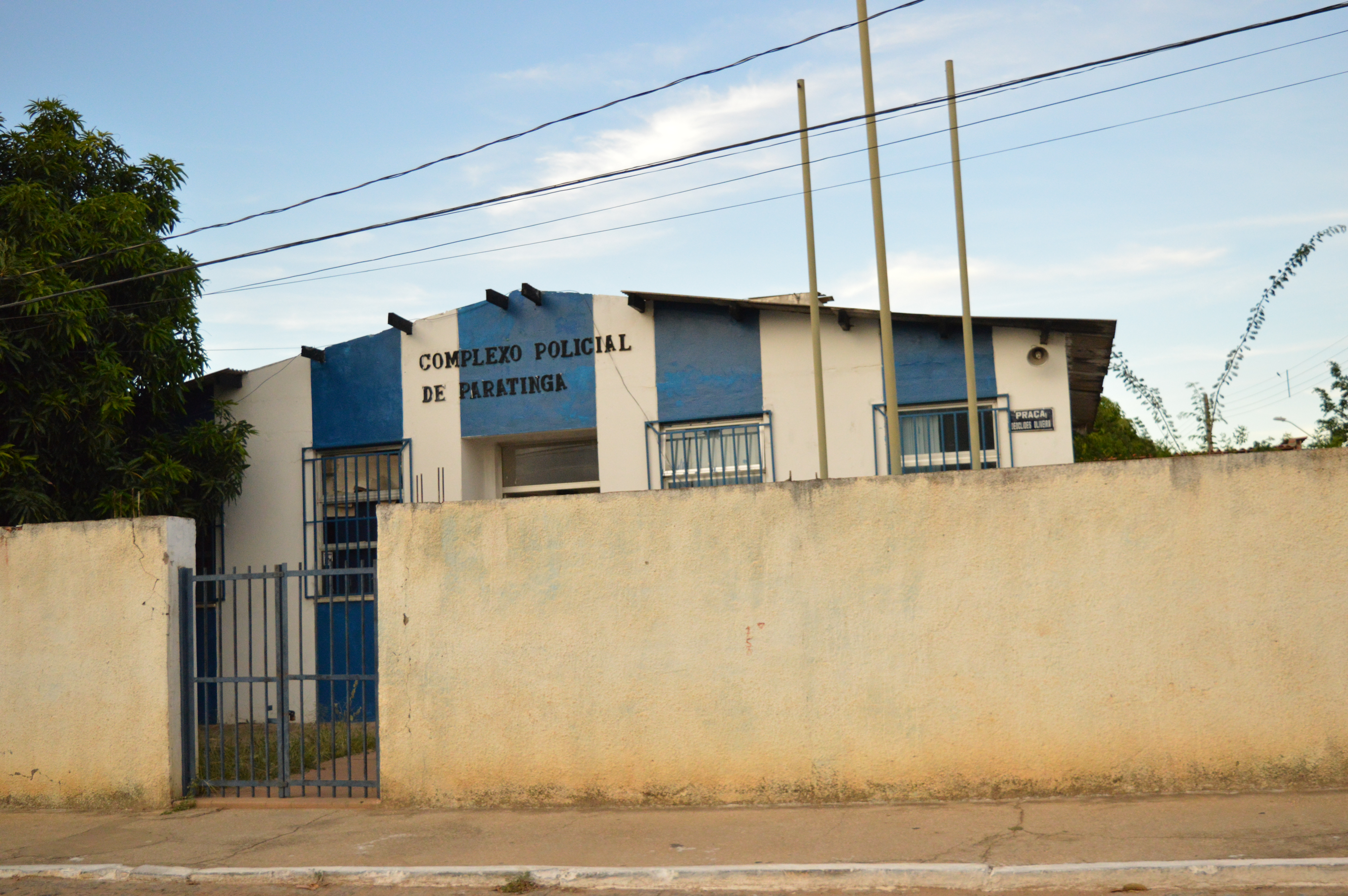 Complexo Policial da cidade brasileira de Paratinga. Foto de 16 de janeiro de 2017.